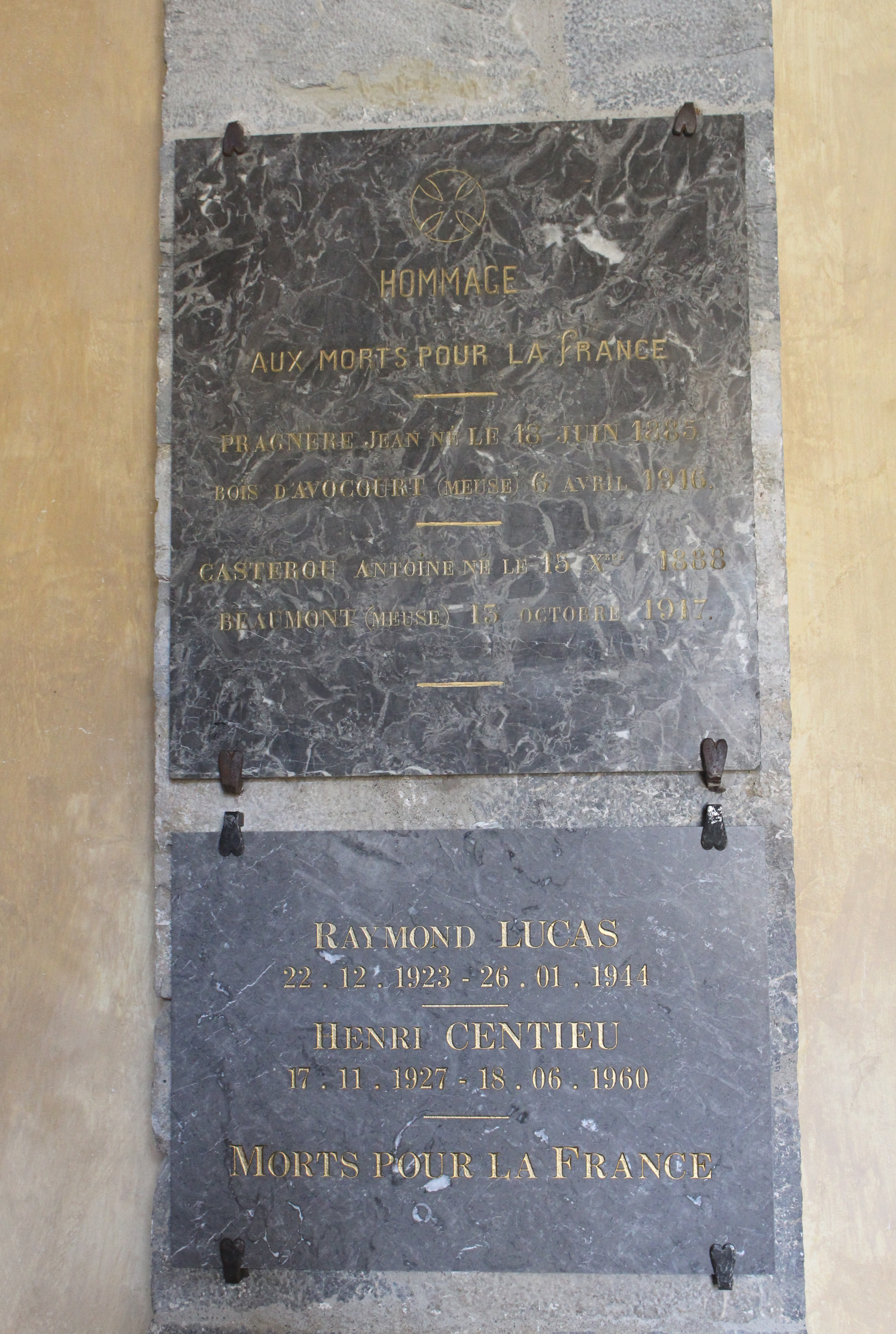 Monument aux morts de Sère-en-Lavedan (Hautes-Pyrénées)